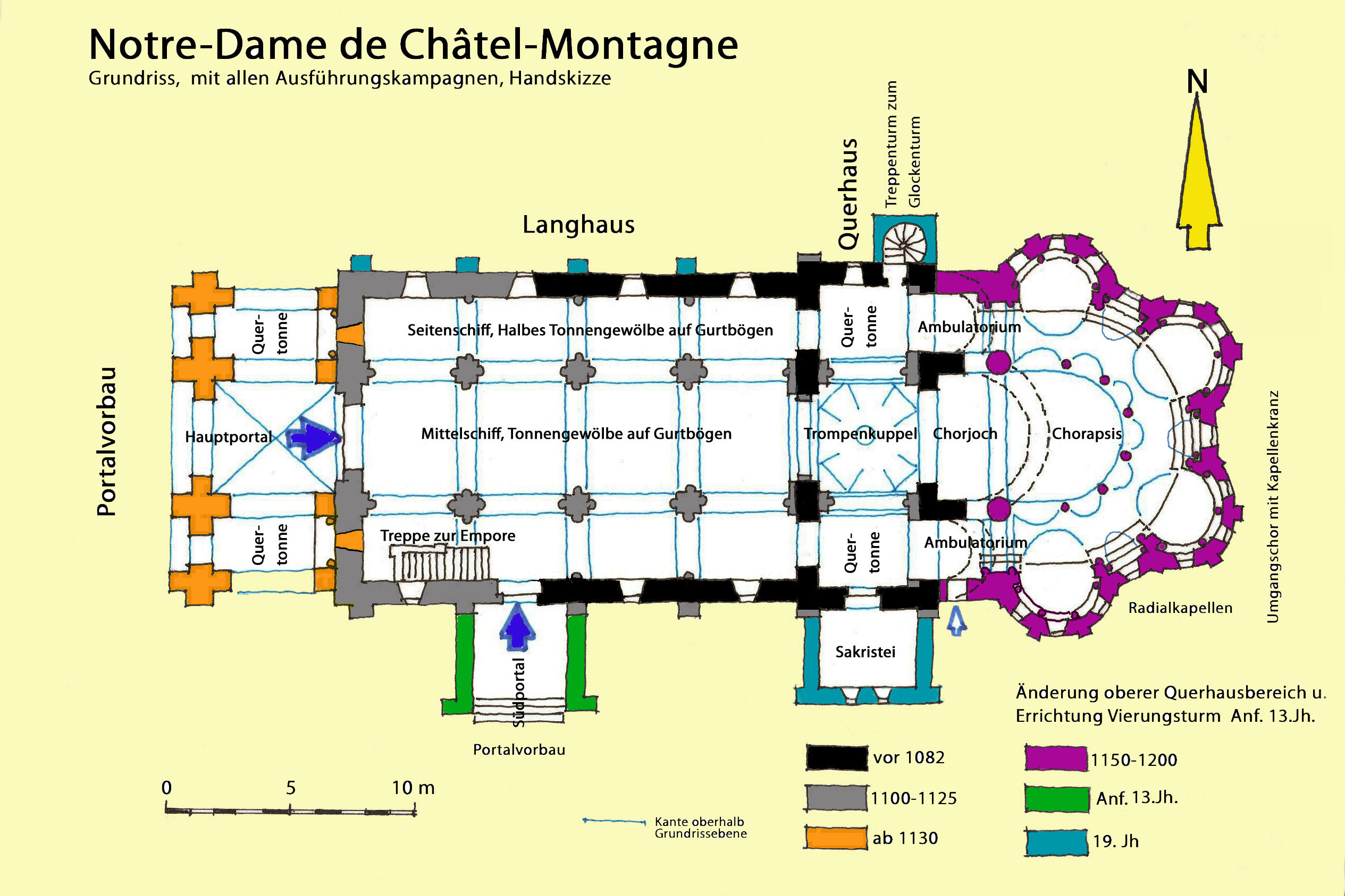 N.-D._de_Châtel-Montagne._alle_Abschnitte.Grundriss, Handskizze